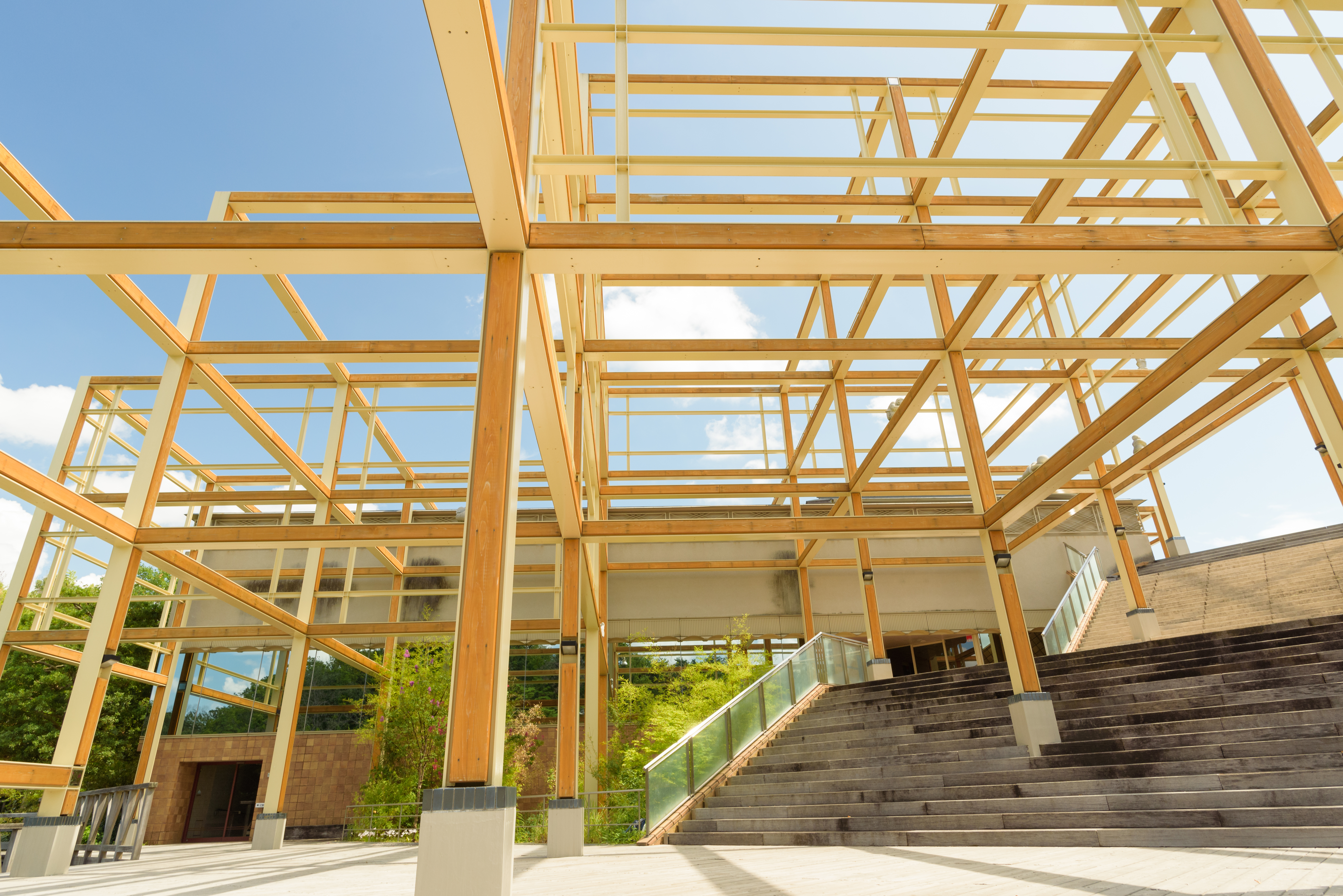 けいはんな記念公園観月楼